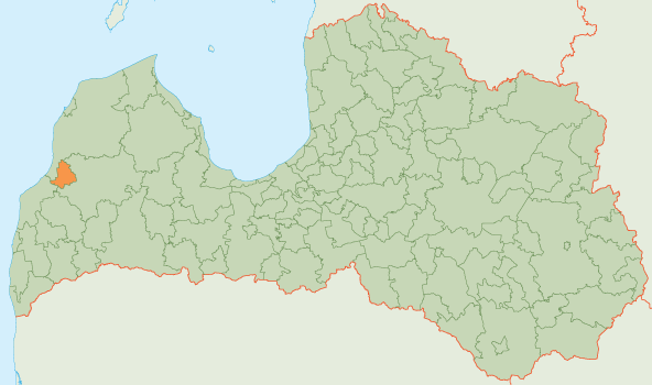 Mapa de Alsunga